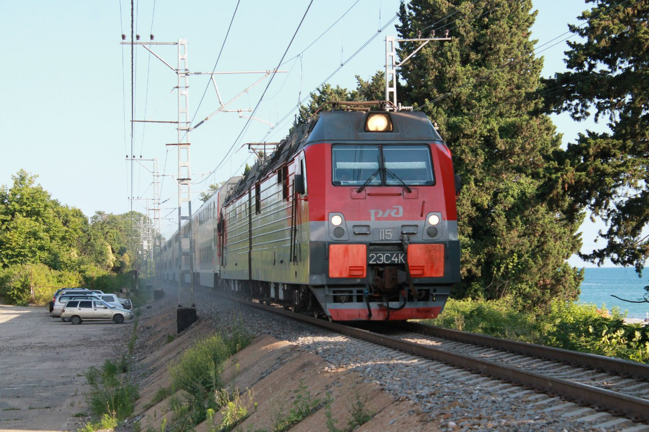 Поезд 36 Адлер - С.Петербург